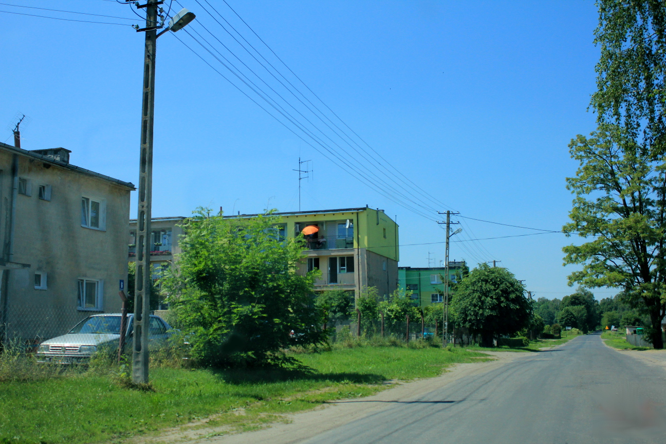 Popegeerowskie bloki w Leśniczówce w województwie mazowieckim, w powiecie siedleckim, w gminie Mordy.